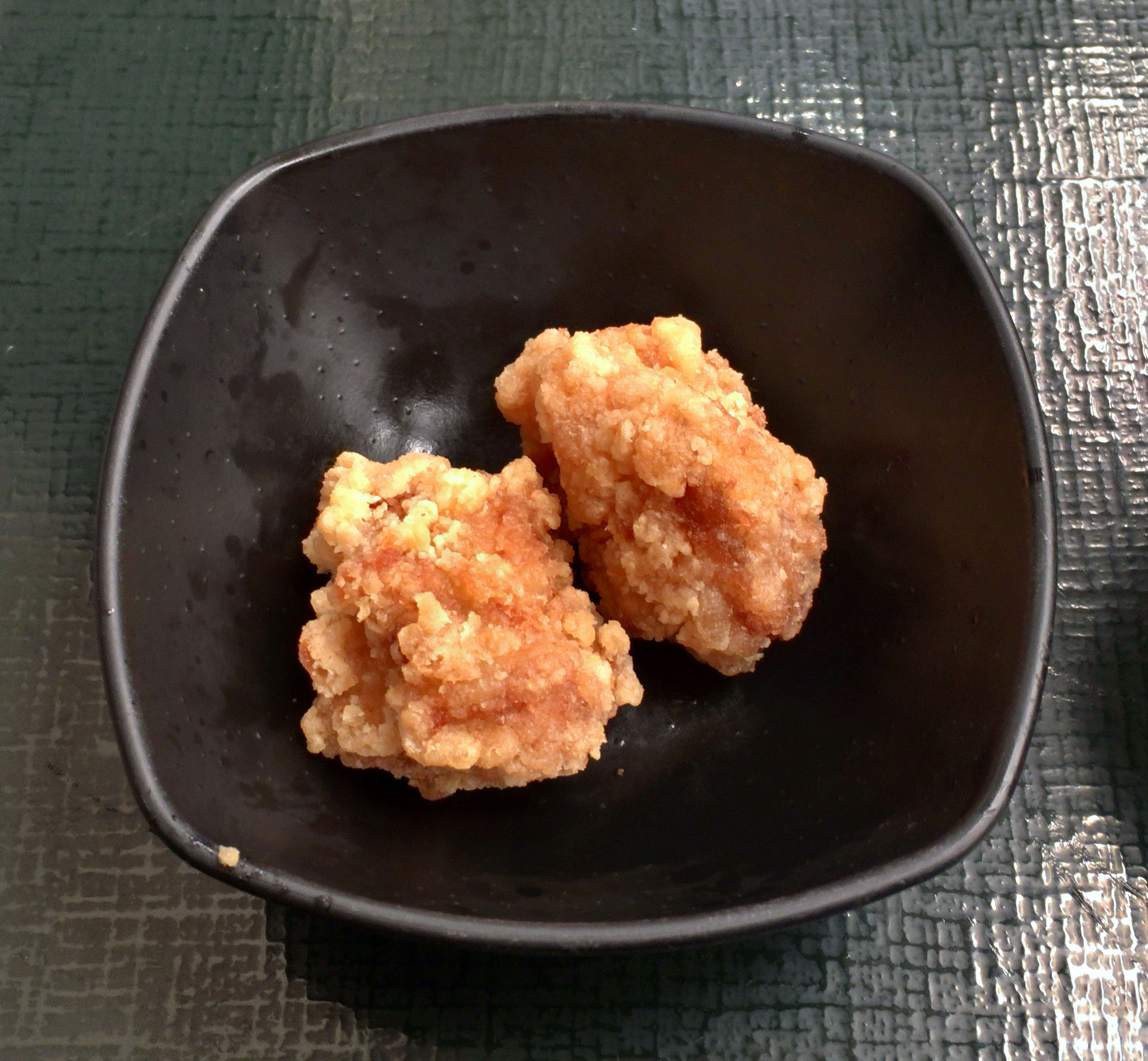 なか卯 唐揚げ